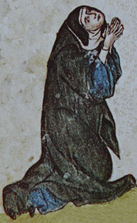 Kunhuta Přemyslovna